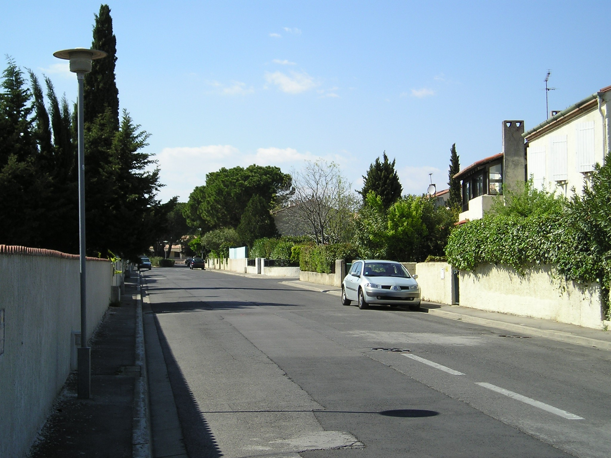 La rue de la Méditerranée à Maurin, commune de Lattes, est une des premières rues construites dans ce village en 1965. Elle part du rond-point de la Vierge (voir cette image) et se dirige vers la place des Arcades (à l'arrière-plan, voir).